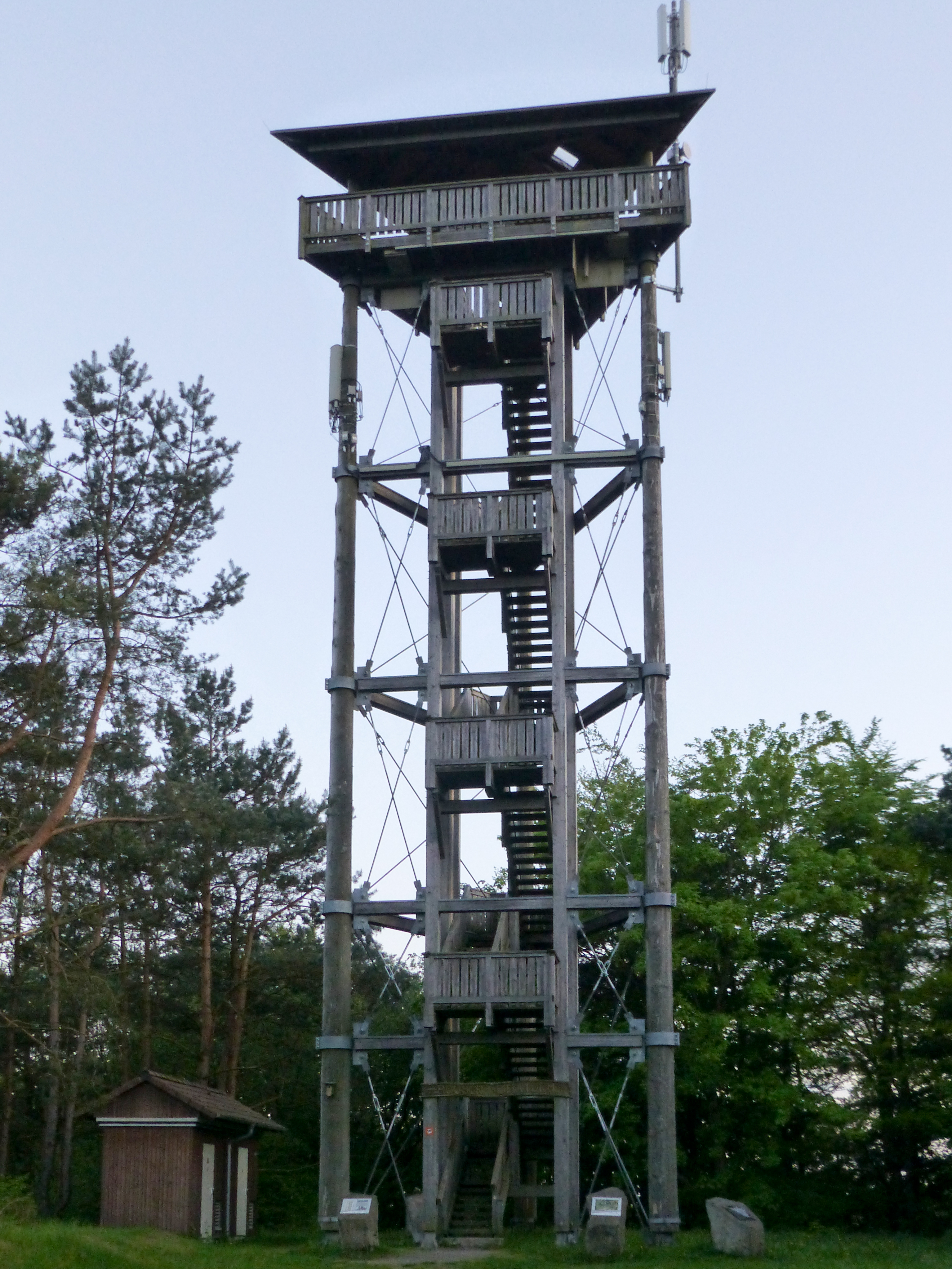 Booser Eifelturm im Mai 2016